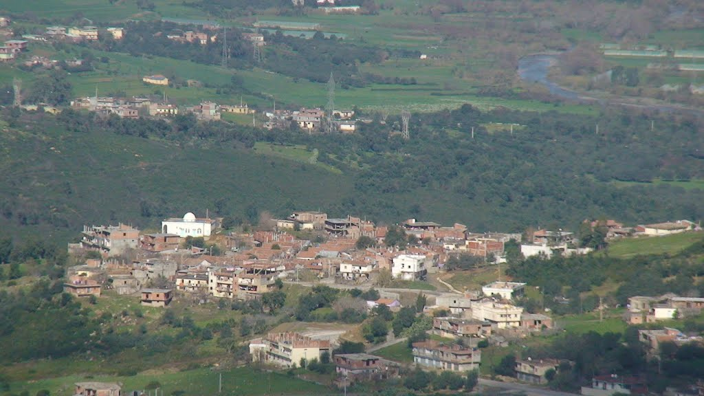 vue générale